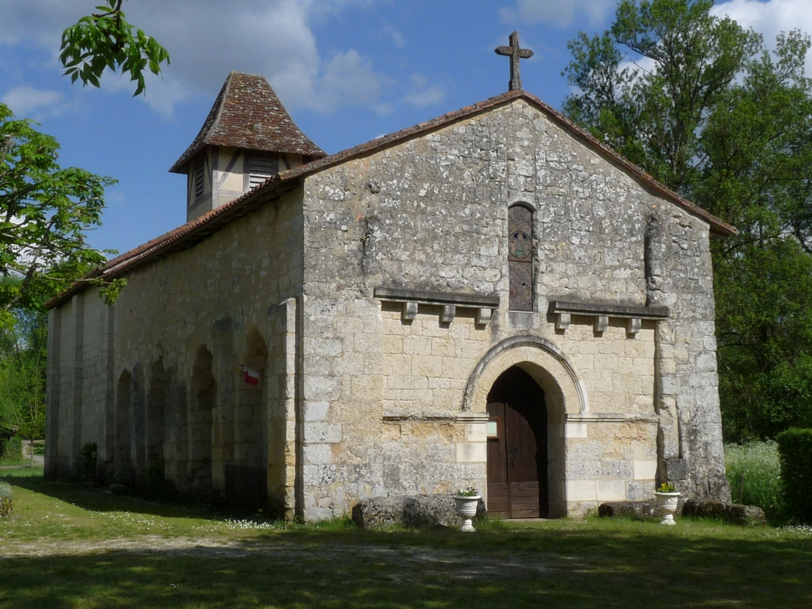 Eglise de Ponteyraud, Dordogne, France